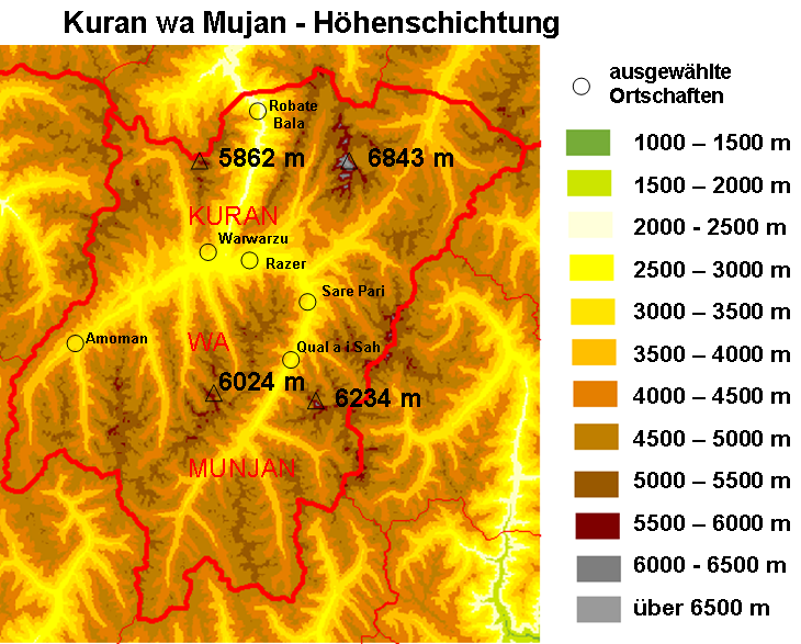 Höhenschichtung des Disrikts Kuran wa Mujan